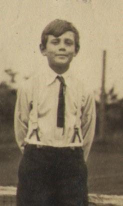 Георгий Брасов